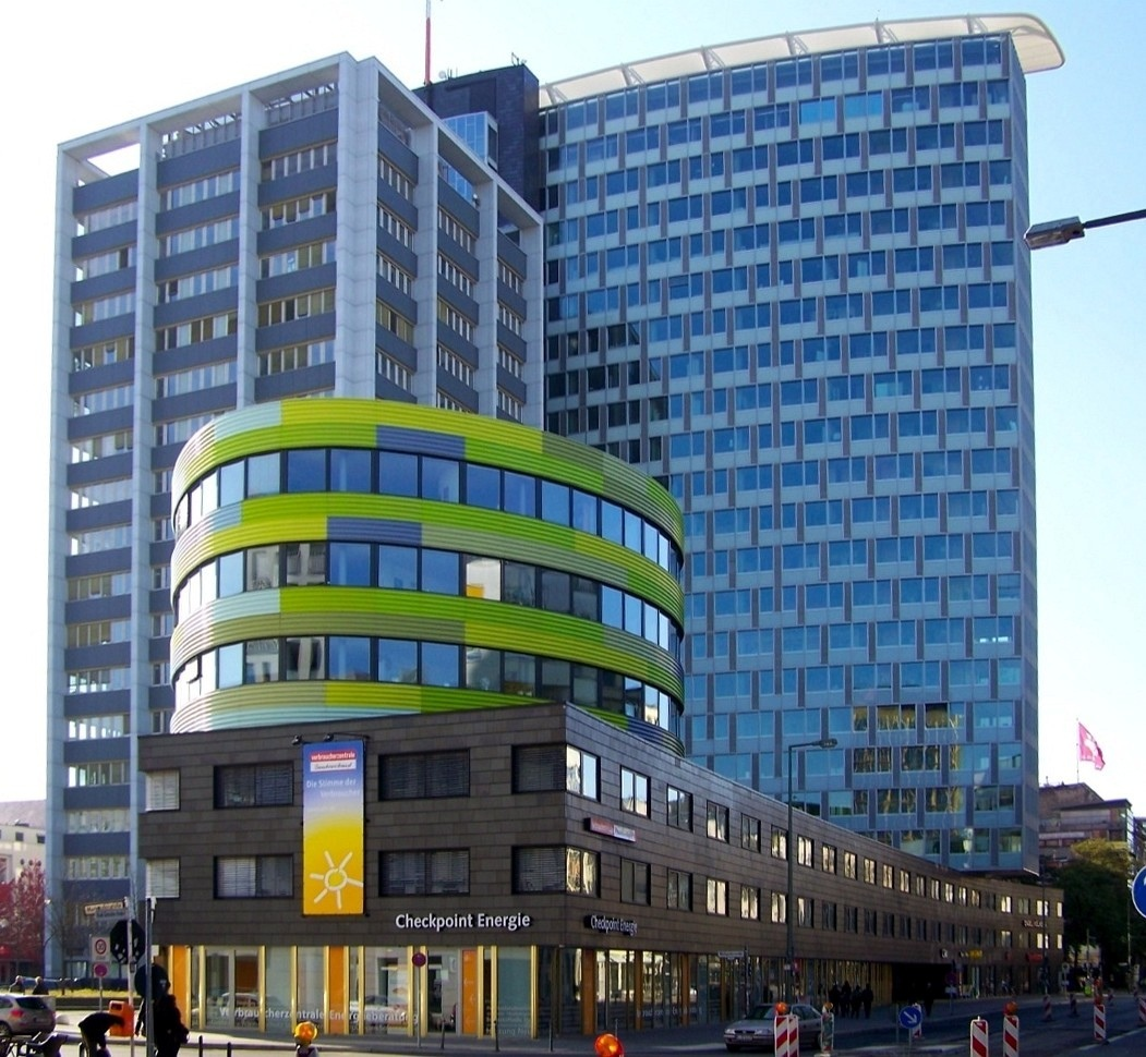 Das GSW-Hochhaus in Berlin-Kreuzberg unweit der Friedrichstr. Ost-Ansicht des Ensembles. Zu sehen ist der Altbau, die Hochhausscheibe und der Flachbau mit dem runden Aufbau.